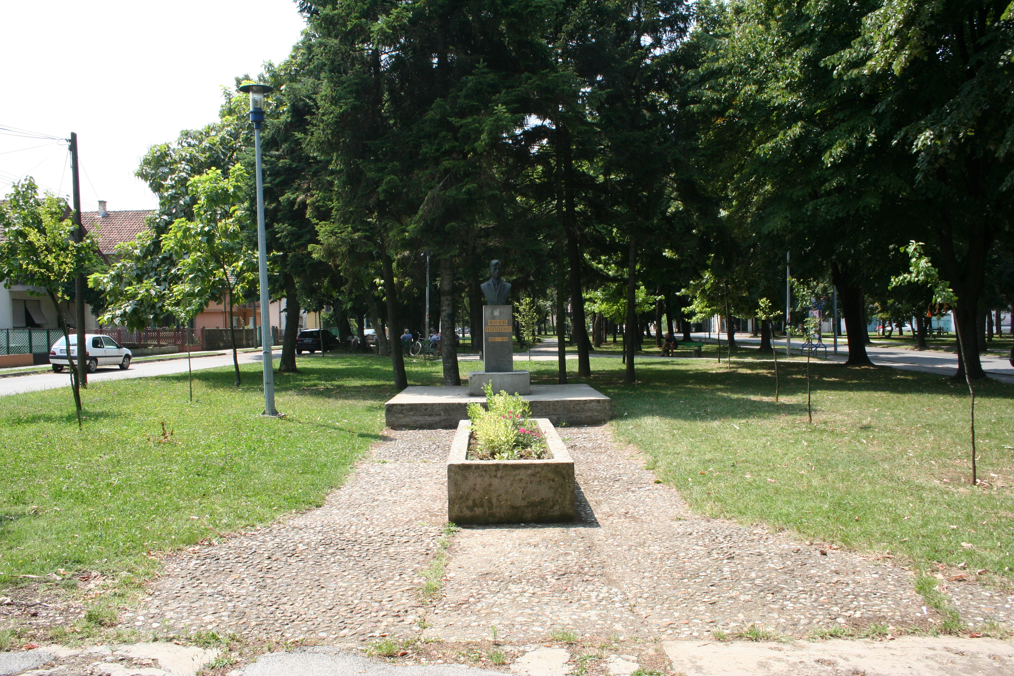 Spomenik i park u ulici Žike Popović, Šabac